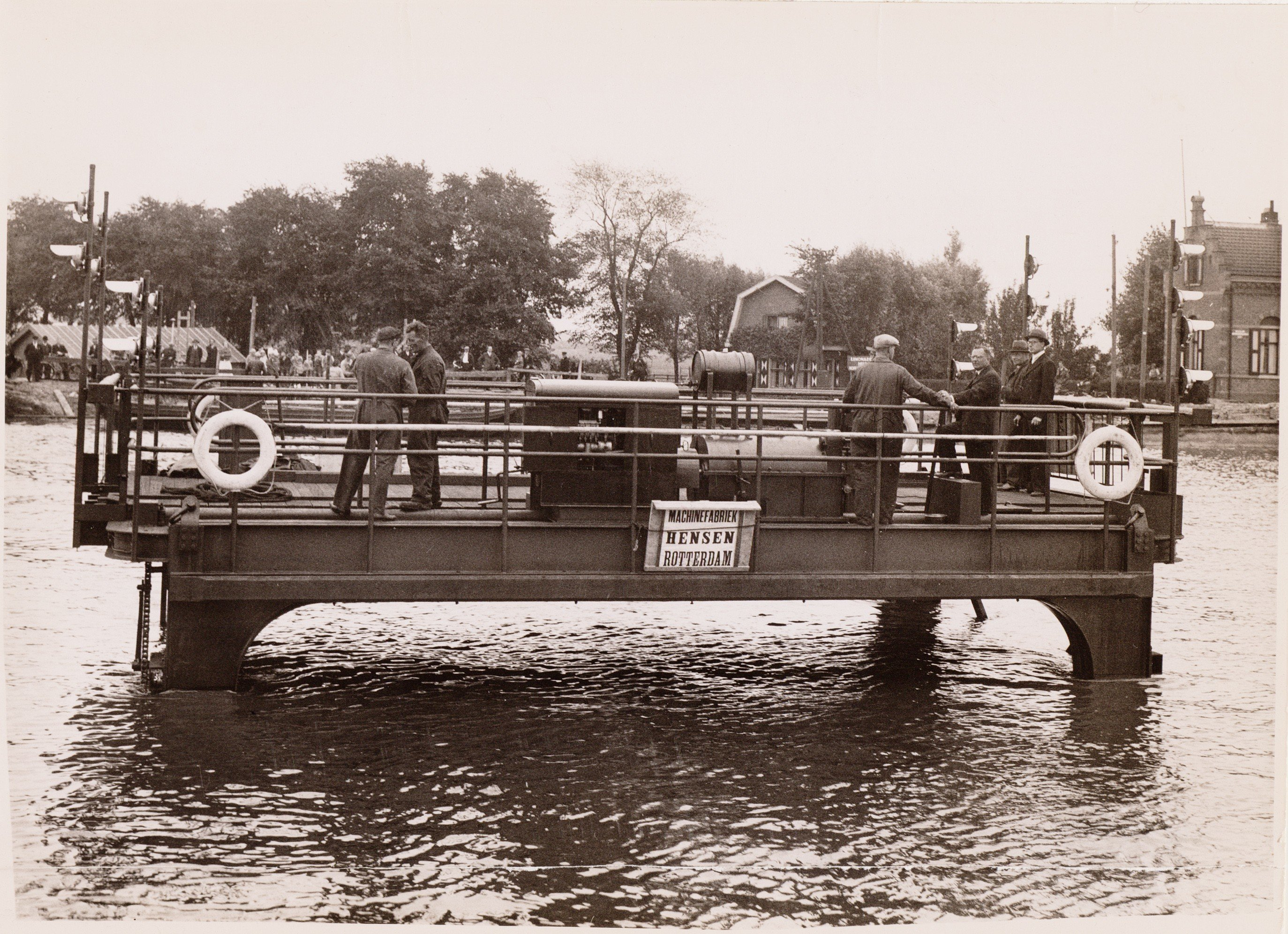 Beschrijving Westelijke Merwedekanaaldijk De eerste tocht van de rijdende pont bij Zeeburg in het Merwedekanaal Documenttype foto Collectie Collectie Stadsarchief Amsterdam: foto-afdrukken Datering 20 augustus 1937 ca. Geografische naam Zeeburg Westelijke Merwedekanaaldijk Inventarissen Afbeeldingsbestand OSIM00004005063 010003022589, 19-11-2003, 12:17, 8C, 4230x3794 (1288+1621), 100%, Foto=normaal c, 1/120 s, R32.1, G14.1, B21.7